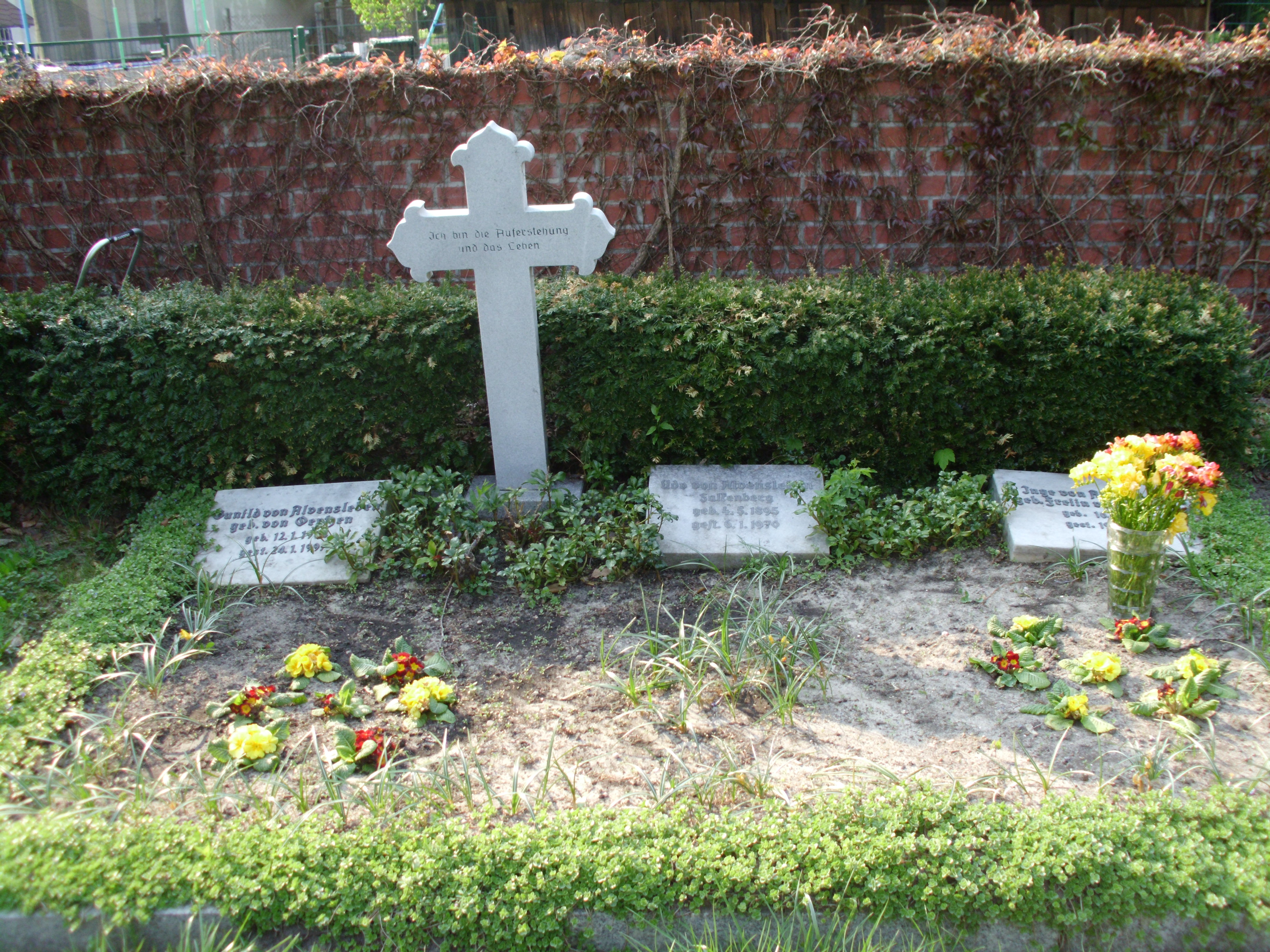 Familiengrab von Alvensleben in Falkenberg, Gemeinde Madlitz-Wilmersdorf, Brandenburg